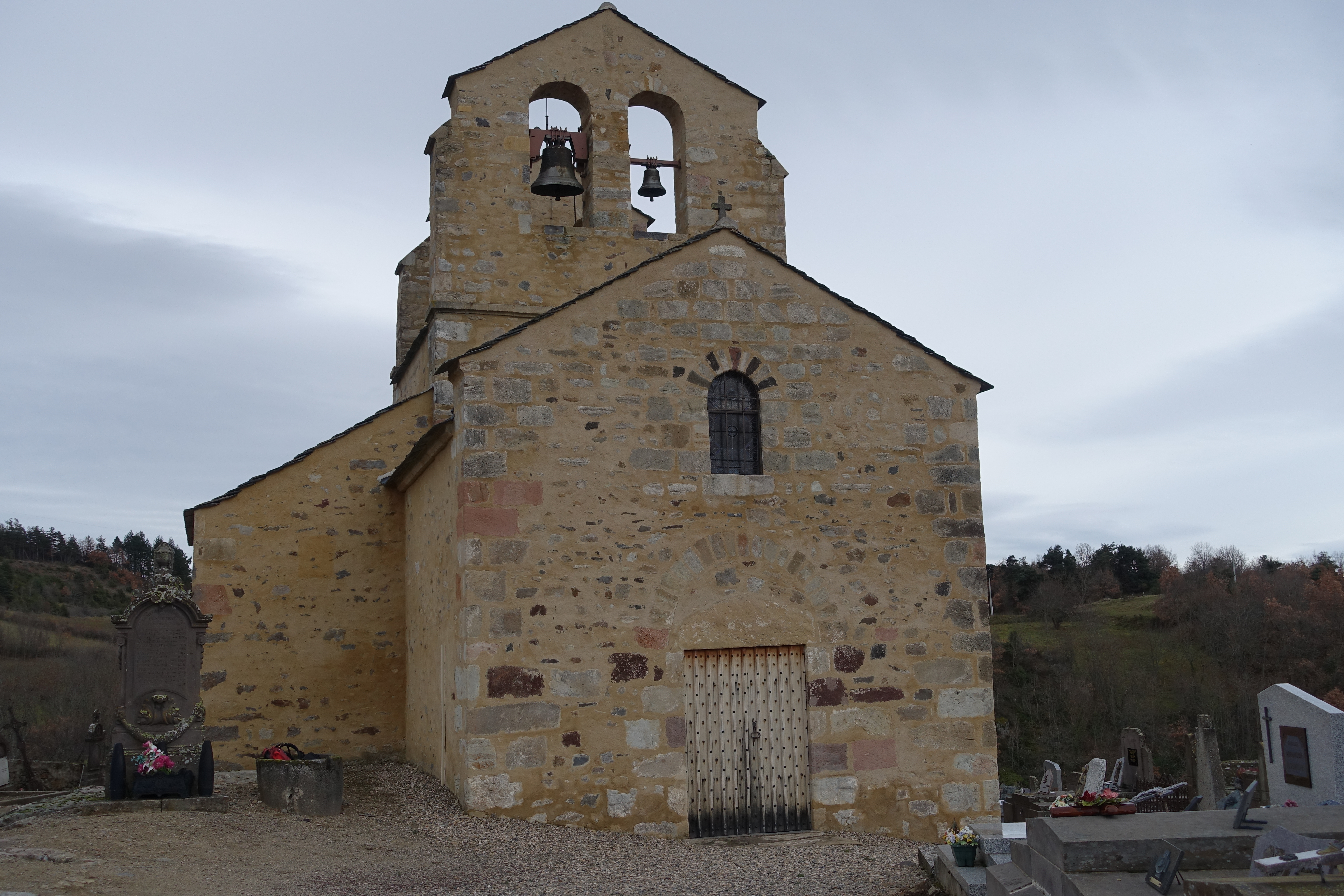 l'Église Sainte-Claire de Saint-Hérent